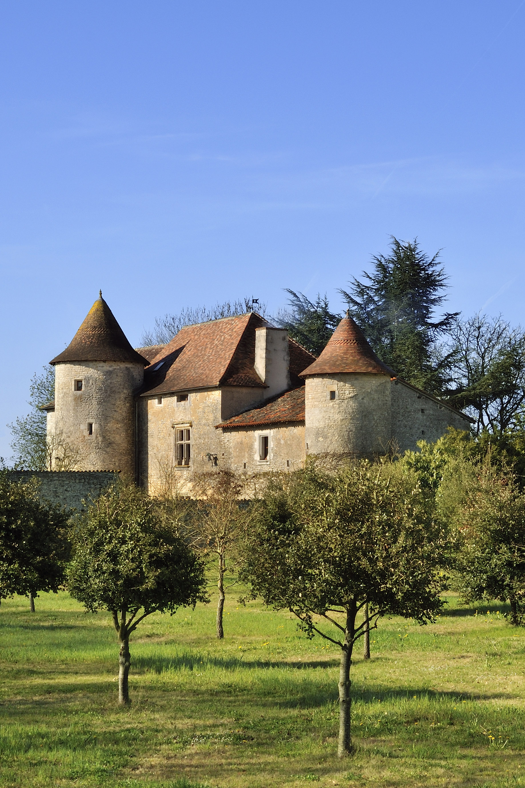 Linazay, logis du Magnou, vue depuis le nord-ouest